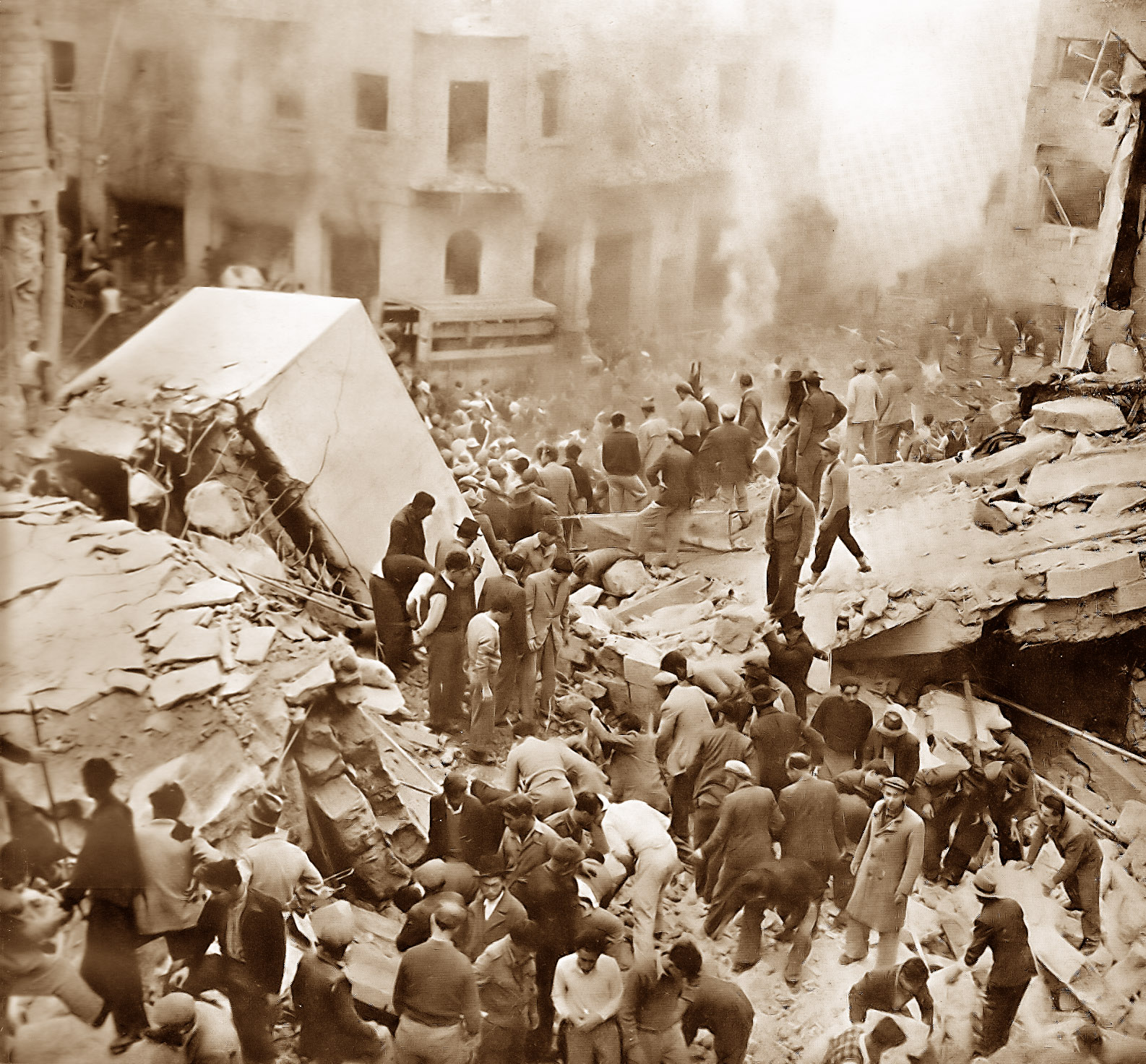 he:22 בפברואר he:1948, פיגוע ענק ברחוב בן יהודה בhe:ירושלים